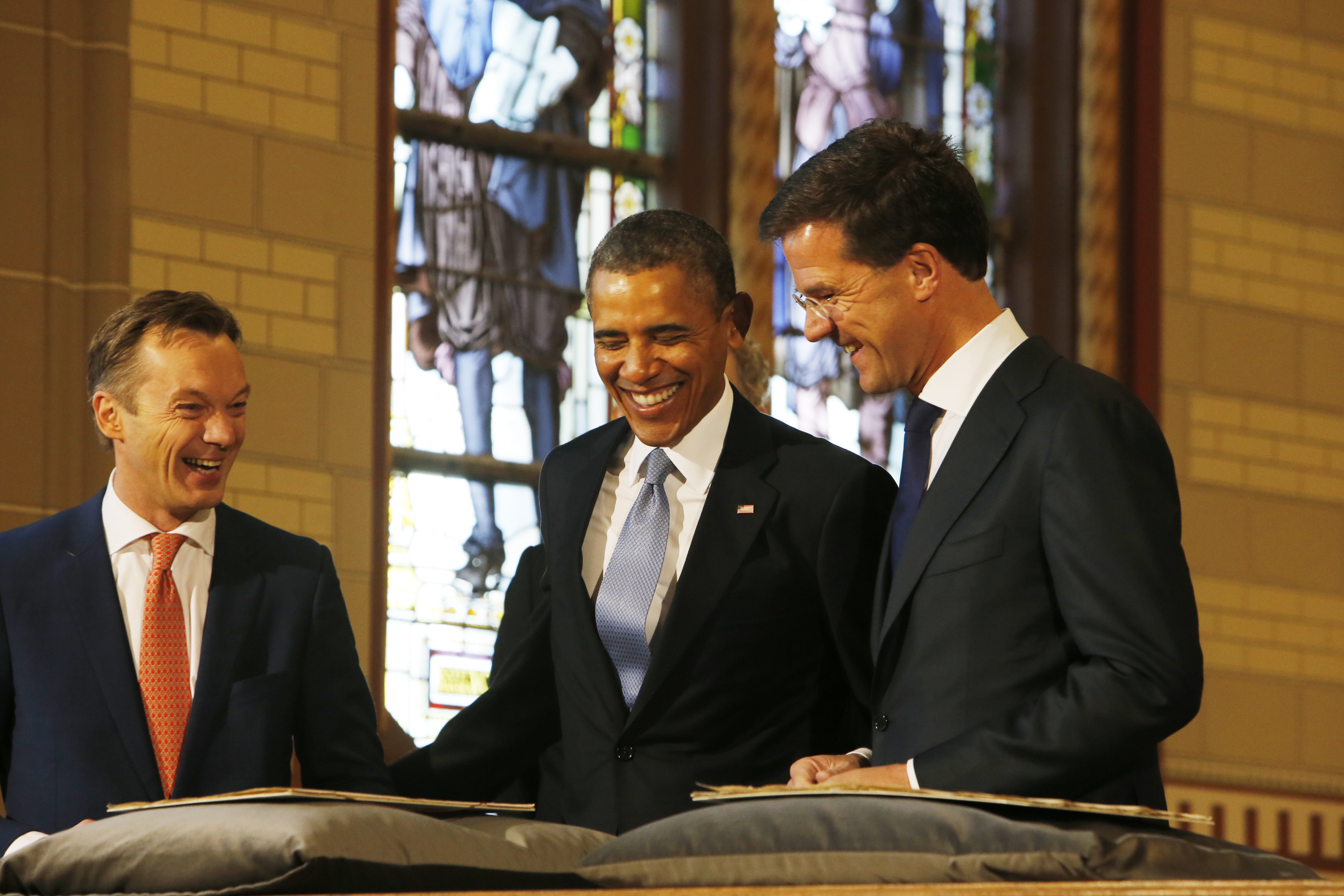 Bij binnenkomst in het Rijksmuseum bekijken de minister-president en de president twee historische documenten die de bilaterale relatie tussen Nederland en de Verenigde Staten markeren: het Plakkaat van Verlatinghe uit 1581 en het eerste Amerikaans-Nederlandse handels- en vriendschapsverdrag uit 1782. Het Plakkaat van Verlatinghe, dat diende als inspiratie voor de Amerikaanse onafhankelijkheidsverklaring, is speciaal voor het bezoek van president Obama van het Nationaal Archief vanuit Den Haag naar het Rijksmuseum overgebracht. Minister-president Rutte en president Obama krijgen vervolgens een rondleiding door het Rijksmuseum van directeur Wim Pijbes. Zij zullen op de eregalerij de pronkstukken van het museum bekijken, waaronder De Nachtwacht.